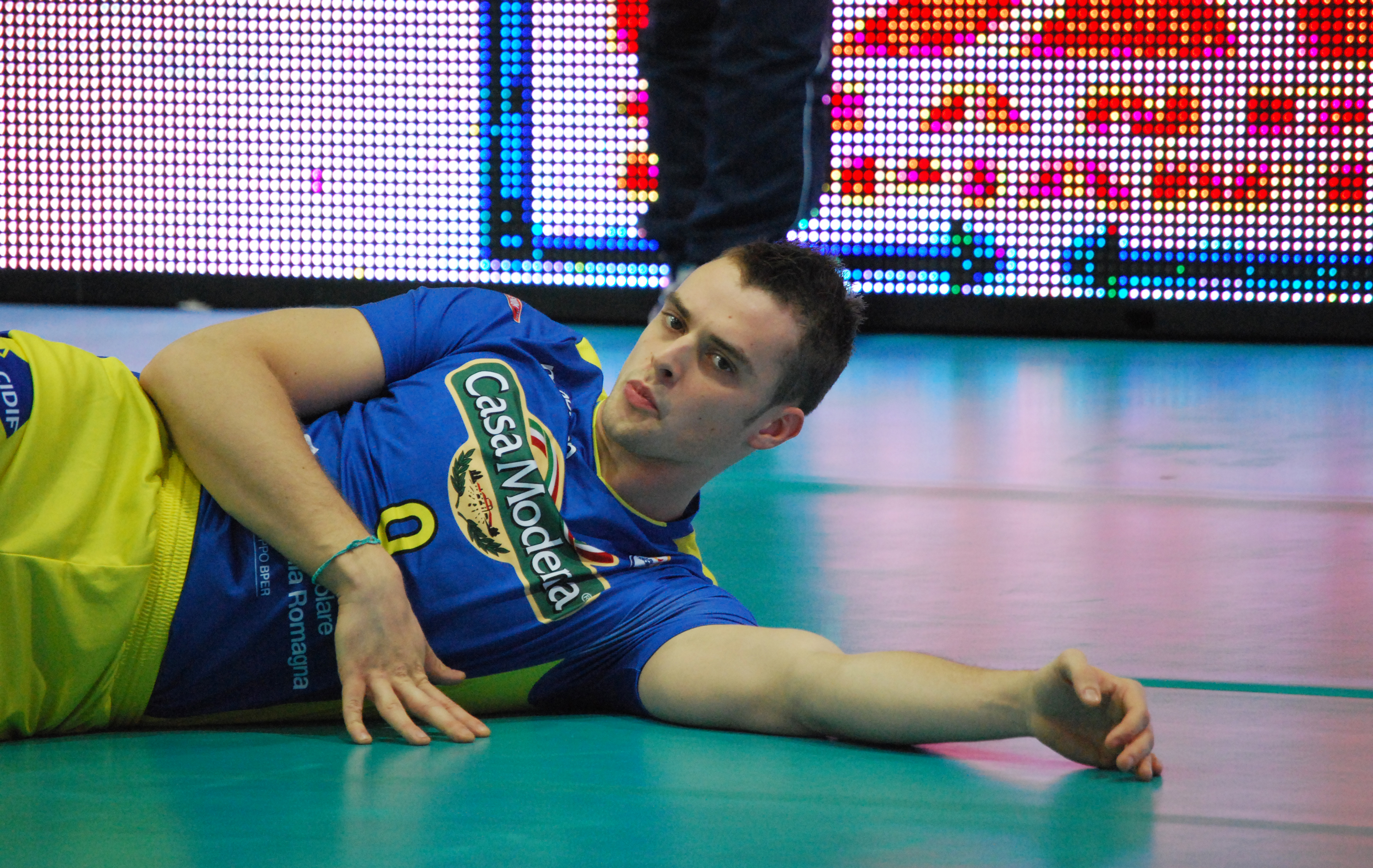 Scattata durante l'incontro Piacenza-Modena